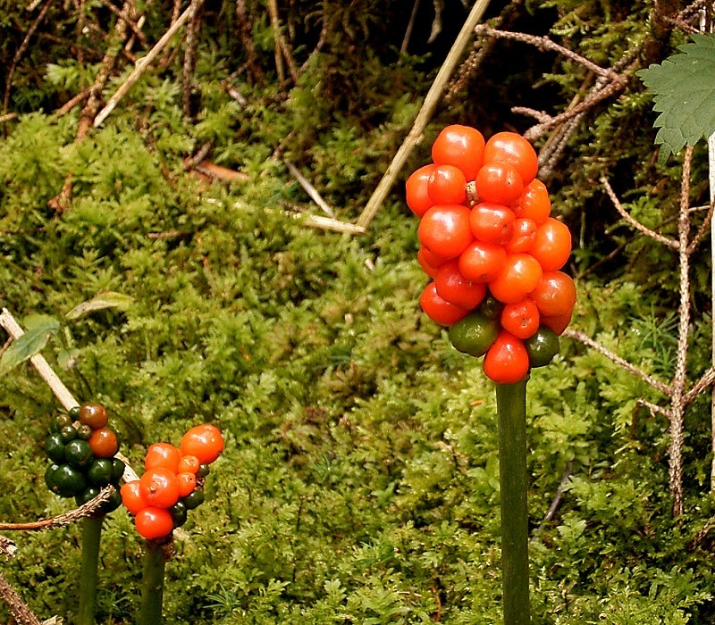 Arum maculatum